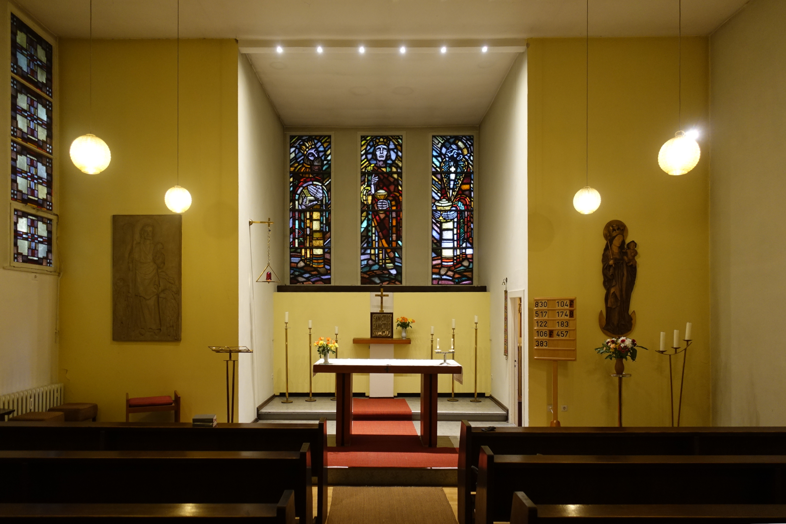 Blick vom Eingang auf den Altar